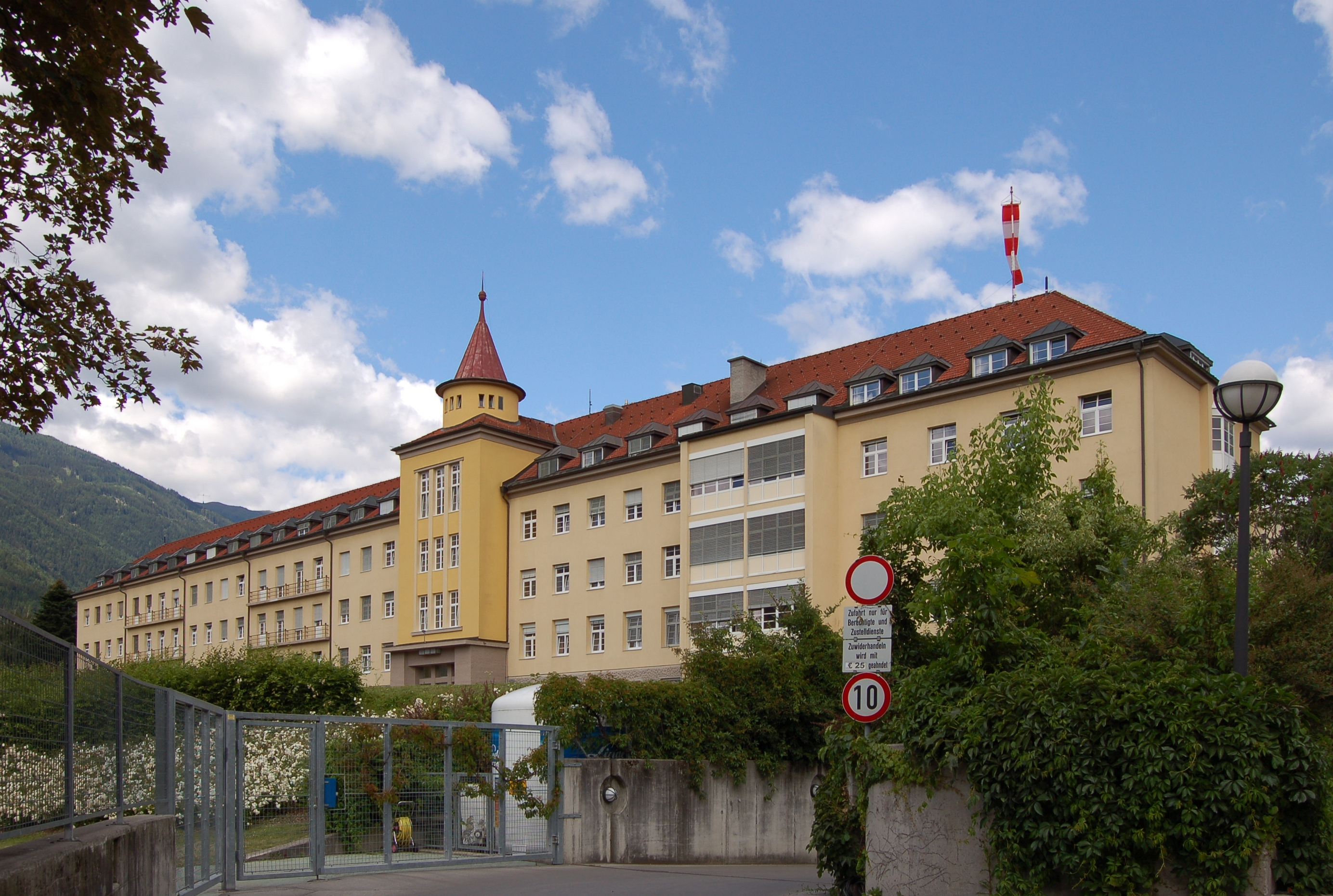 Das denkmalgeschützte Bezirkskrankenhaus in der Emanuel von Hibler-Straße 5 in Lienz.